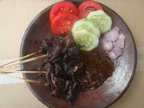 Sate emprit khas Kediri